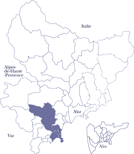 Carte montrant la 7e circonscription des Alpes-maritimes issue du découpage de 1986 (en vigueur de 1988 à 2007). Cette carte est issue d'un support trouvé sur le site du conseil général des Alpes-Maritimes, retravaillé par mes soins.